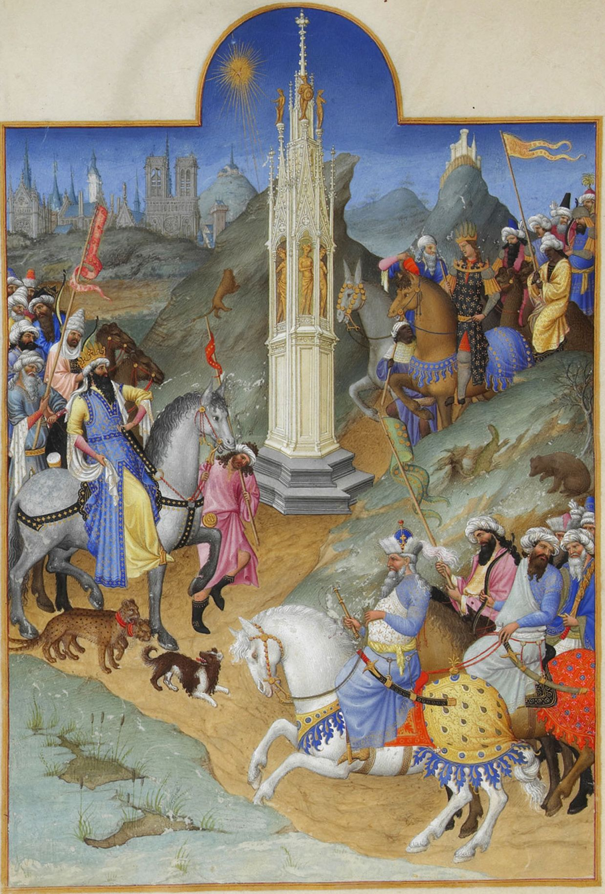 Chaque roi dirige un cortège. Les trois groupes prennent la direction d'un édicule situé au centre, appelé aussi « montjoye », surmonté de l'étoile. Les rois mages représentent les trois âges de la vie : l'adolescent, l'homme et le vieillard. Gaspard, le jeune en haut à droite, est suivi de deux personnages noirs. Balthasar, l'homme, est placé à gauche et Melchior, le vieillard (ici à l'image de l'empereur byzantin Manuel II Paleologue), en bas à droite. Par ailleurs, divers animaux sauvages sont peints : des guépards, un lion, un lézard ainsi qu'un ours, symbole du duc de Berry.